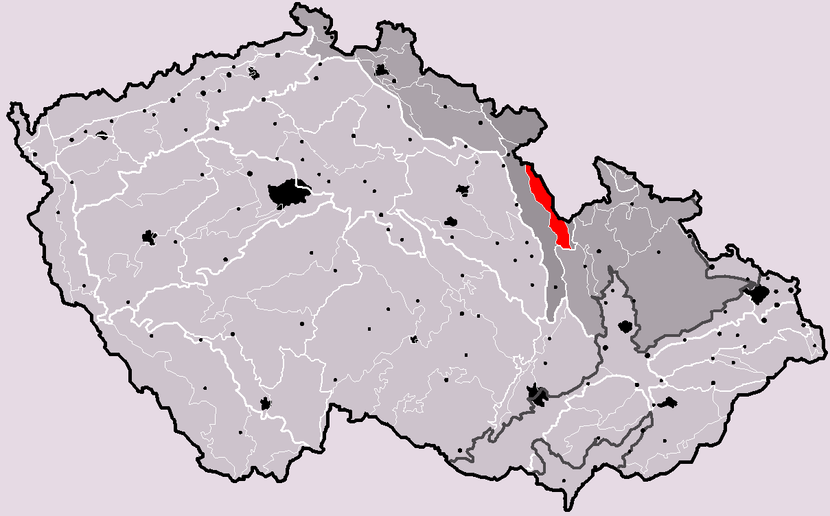 Poloha geomorfologického celku Orlické hory v rámci České republiky. Hercynský systém Hercynská pohoří I Česká vysočina I4 (IV) Krkonošsko-jesenická subprovincie I4B (IVB) Orlická oblast I4B-2 (IVB-2) Orlické hory